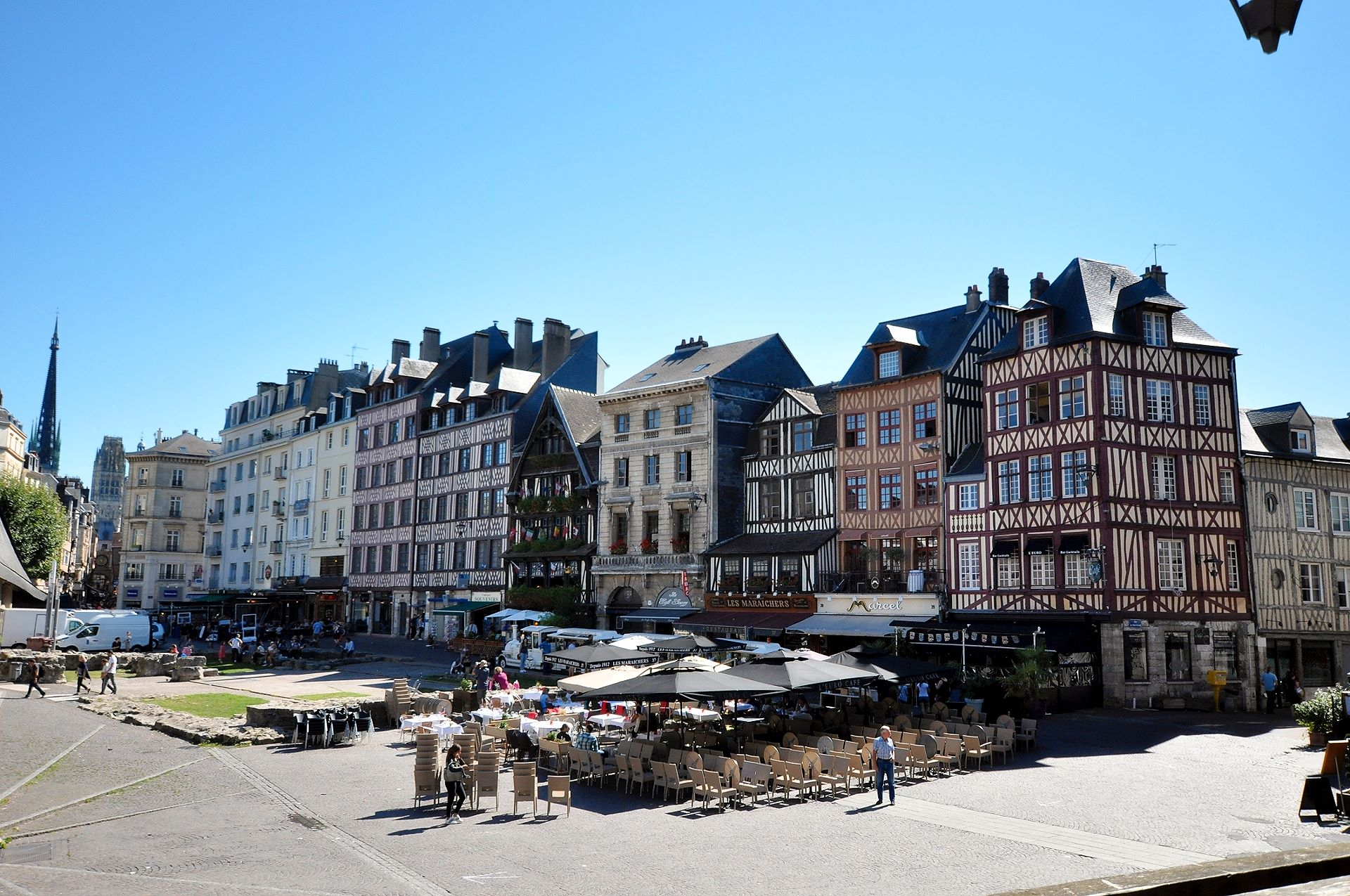 Place du Vieux-Marché, Rouen, France